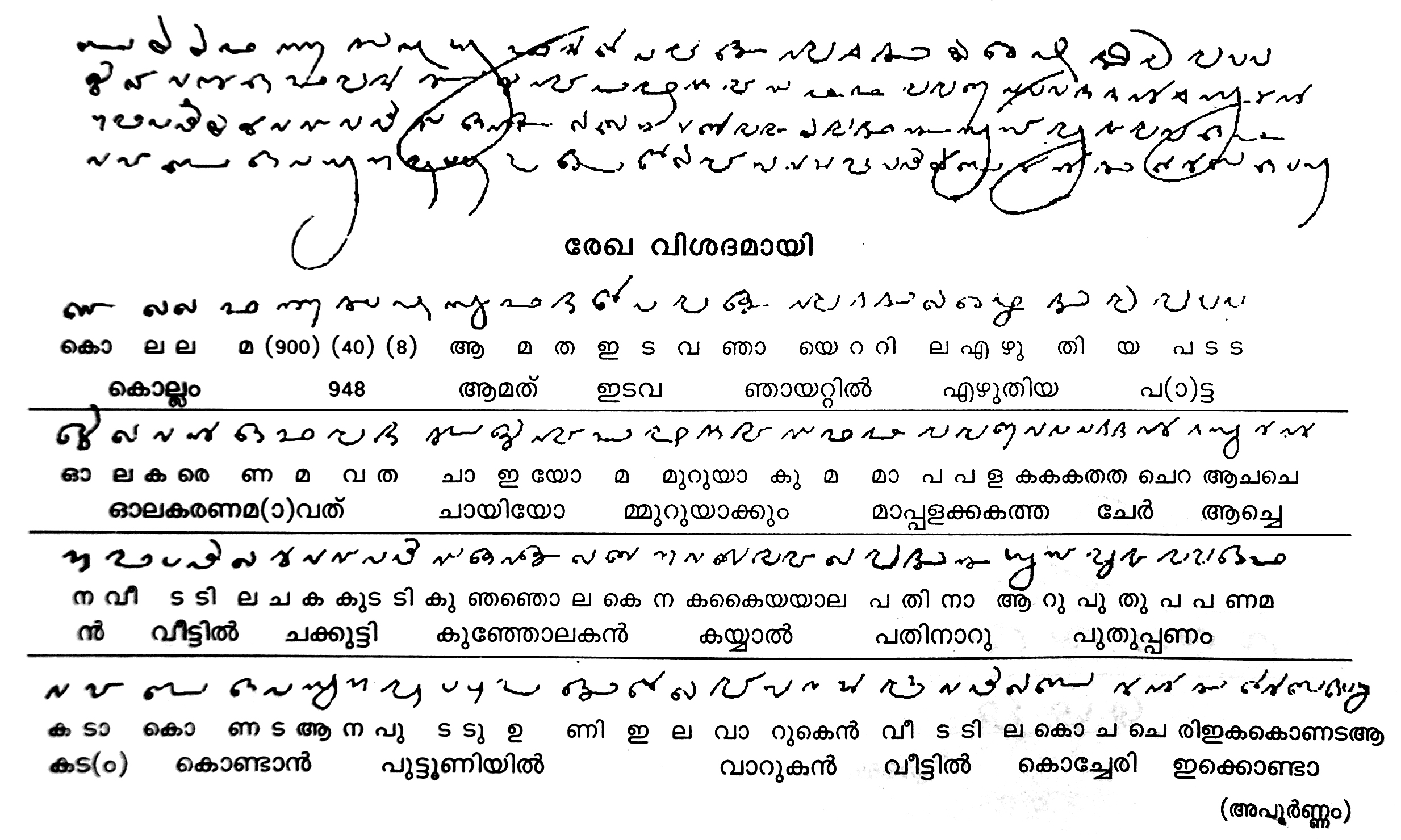 മലയാണ്മ രേഖ (കൊ.വ. 948)കേരളത്തിലെ പ്രാചീന ലിപി മാതൃകകൾ എന്ന ഗ്രന്ഥത്തിൽ നിന്നും പകർത്തിയത് (originally taken from the book "കേരളത്തിലെ പ്രാചീന ലിപികൾ” published in AD 948)